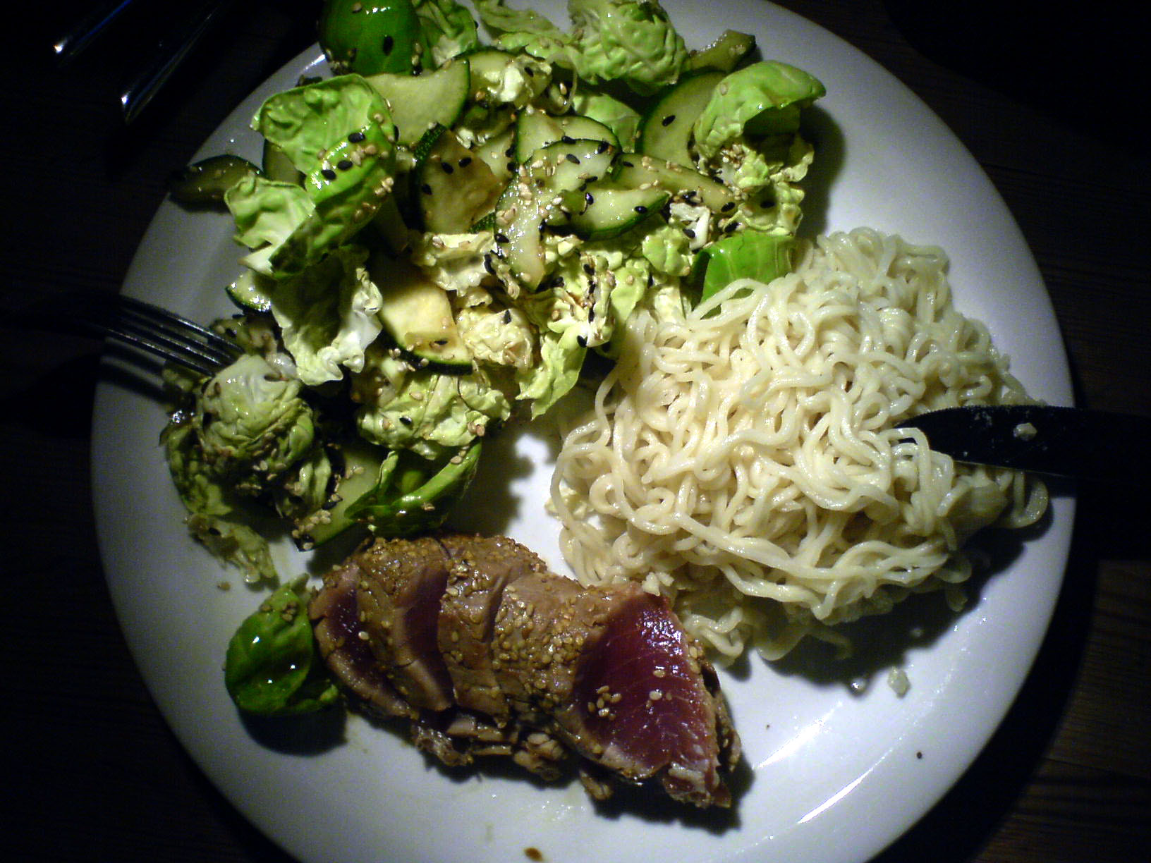 Salat, tun og nudler